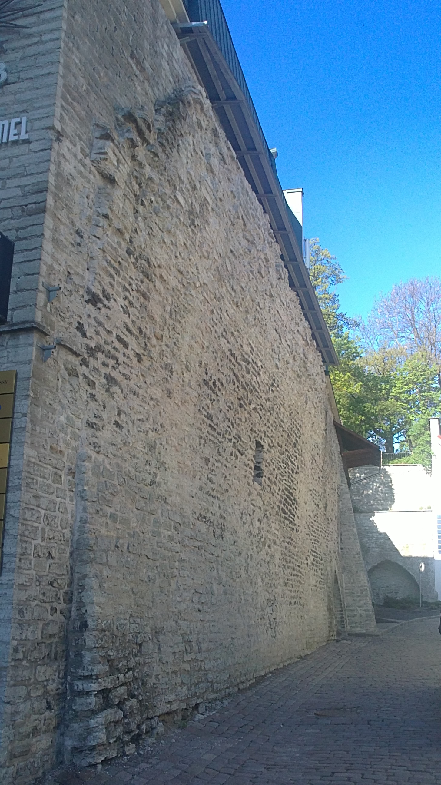 Tallinna linnamüür Rüütli tänaval